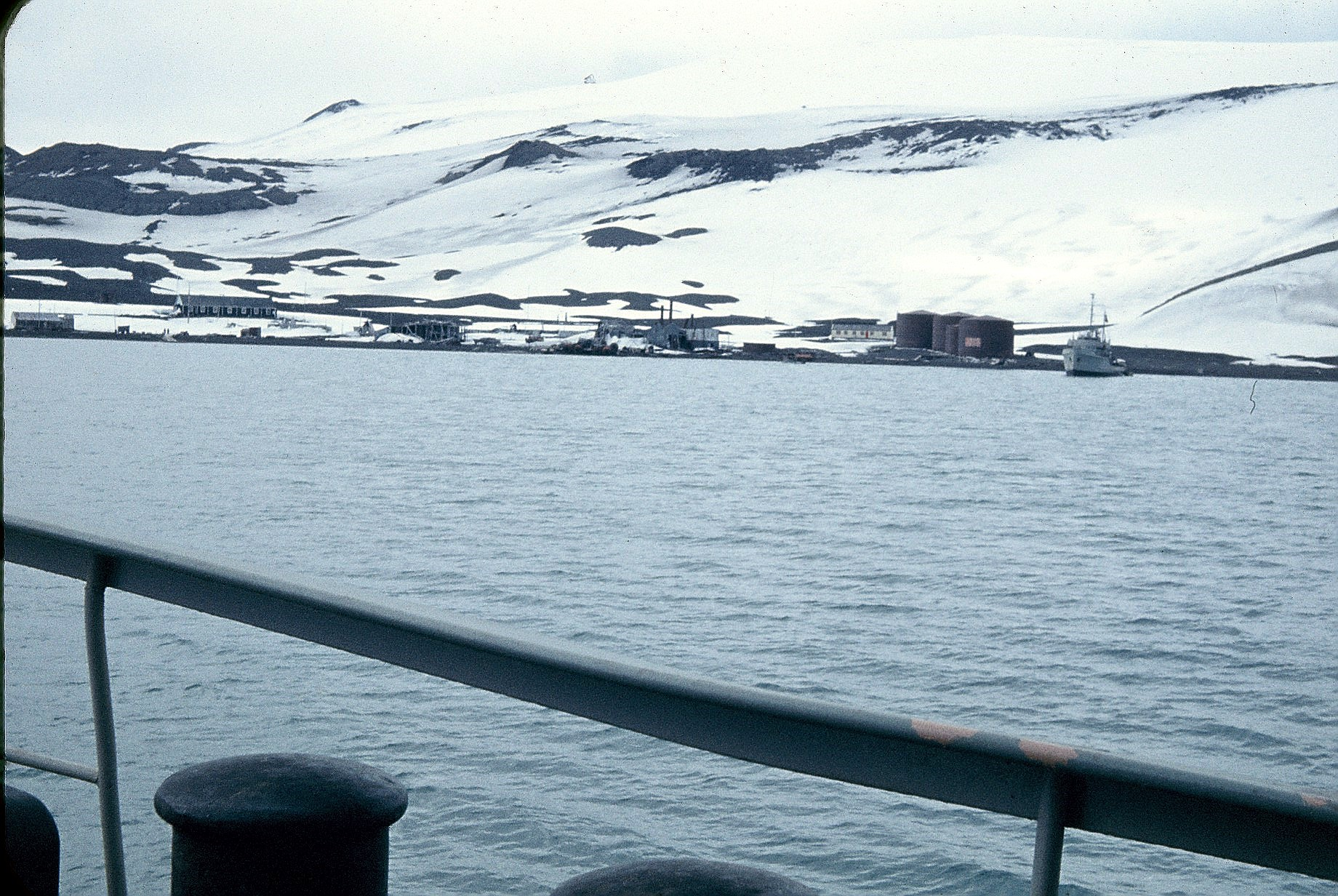 Patrullero Lautaro acoderado en caleta Balleneros, recibiendo agua. Isla Decepción